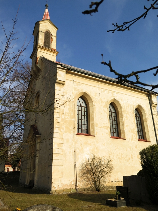 Kostel svatého Jiří, st. 73, pp. 509, Hradsko (Mšeno).